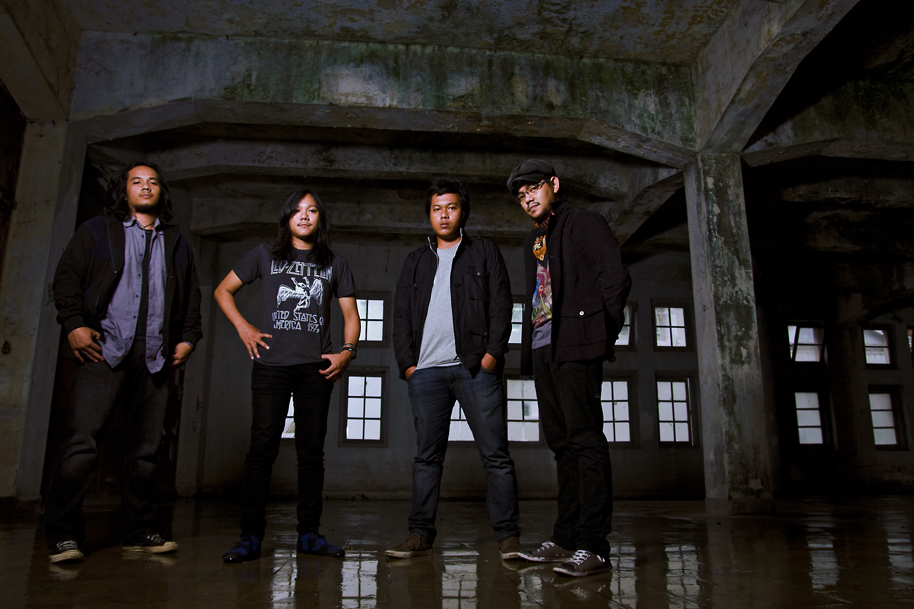 respito